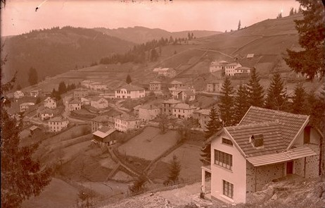 Изглед от село Проглед, Смолянско.